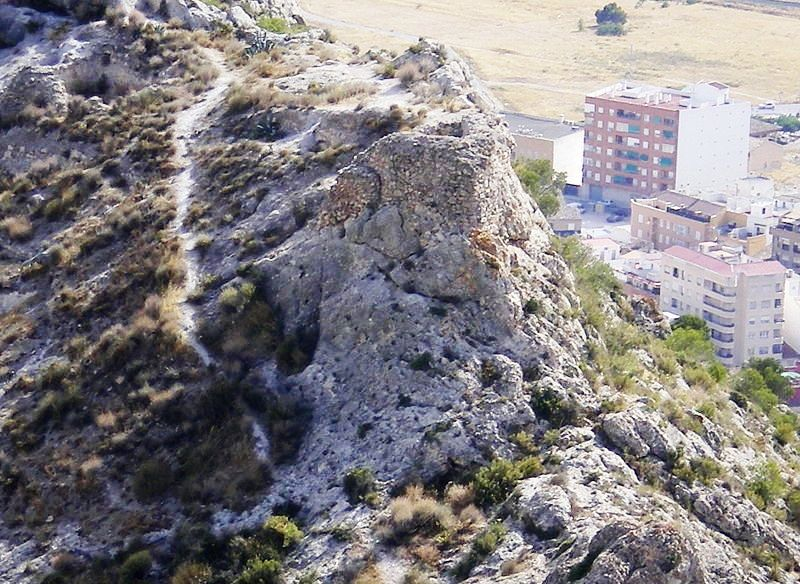 Castillo de Salvatierra en la Sierra de la Villa, Villena. Actualmente en ruinas